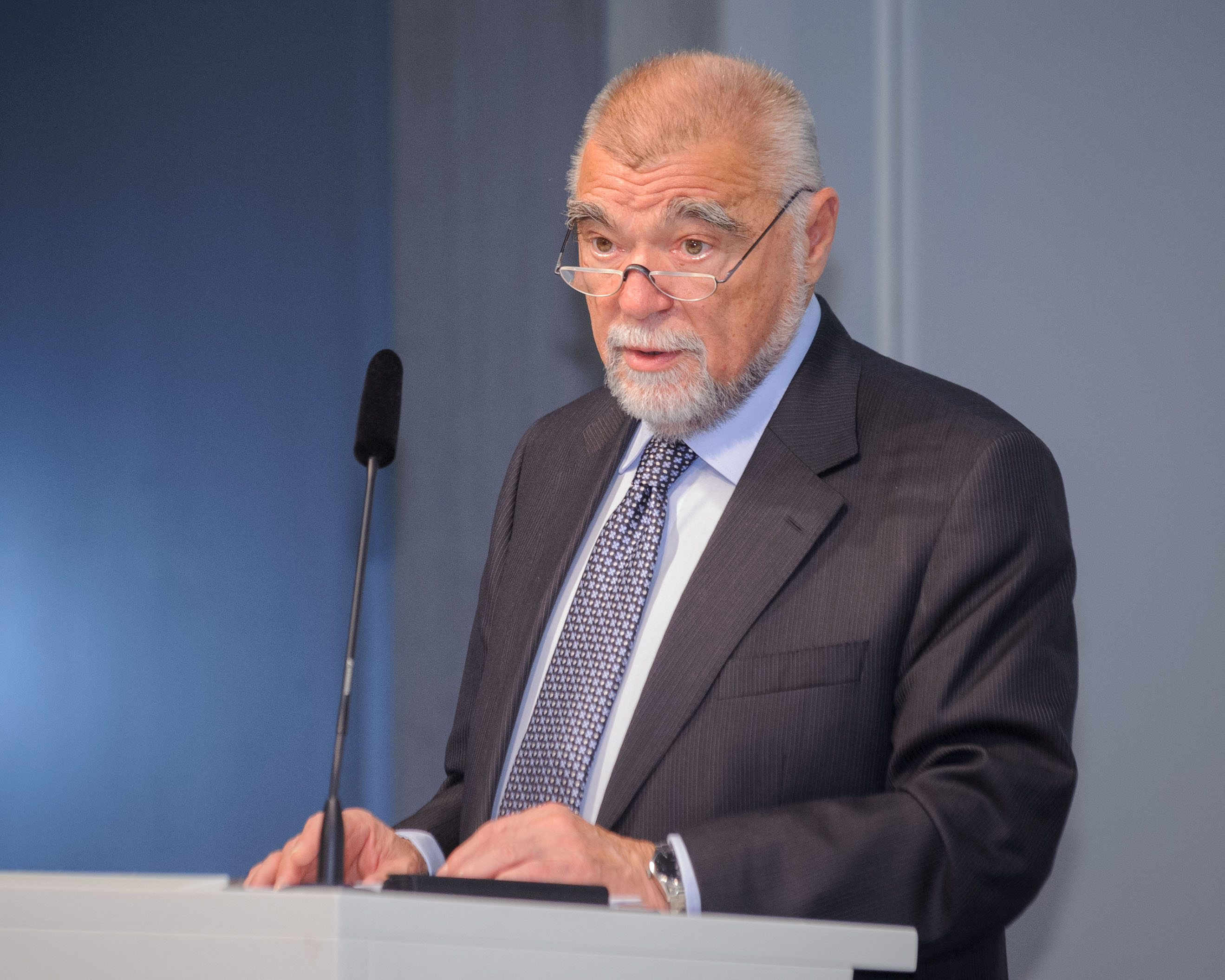 Stjepan Mesic (ehem. Präsident der Republik Kroatien) EU-Beitritt Kroatien - Vortrag und Podiumsdiskussion zu den regionalen Auswirkungen des kroatischen EU-Beitritts Foto: Stephan Röhl (